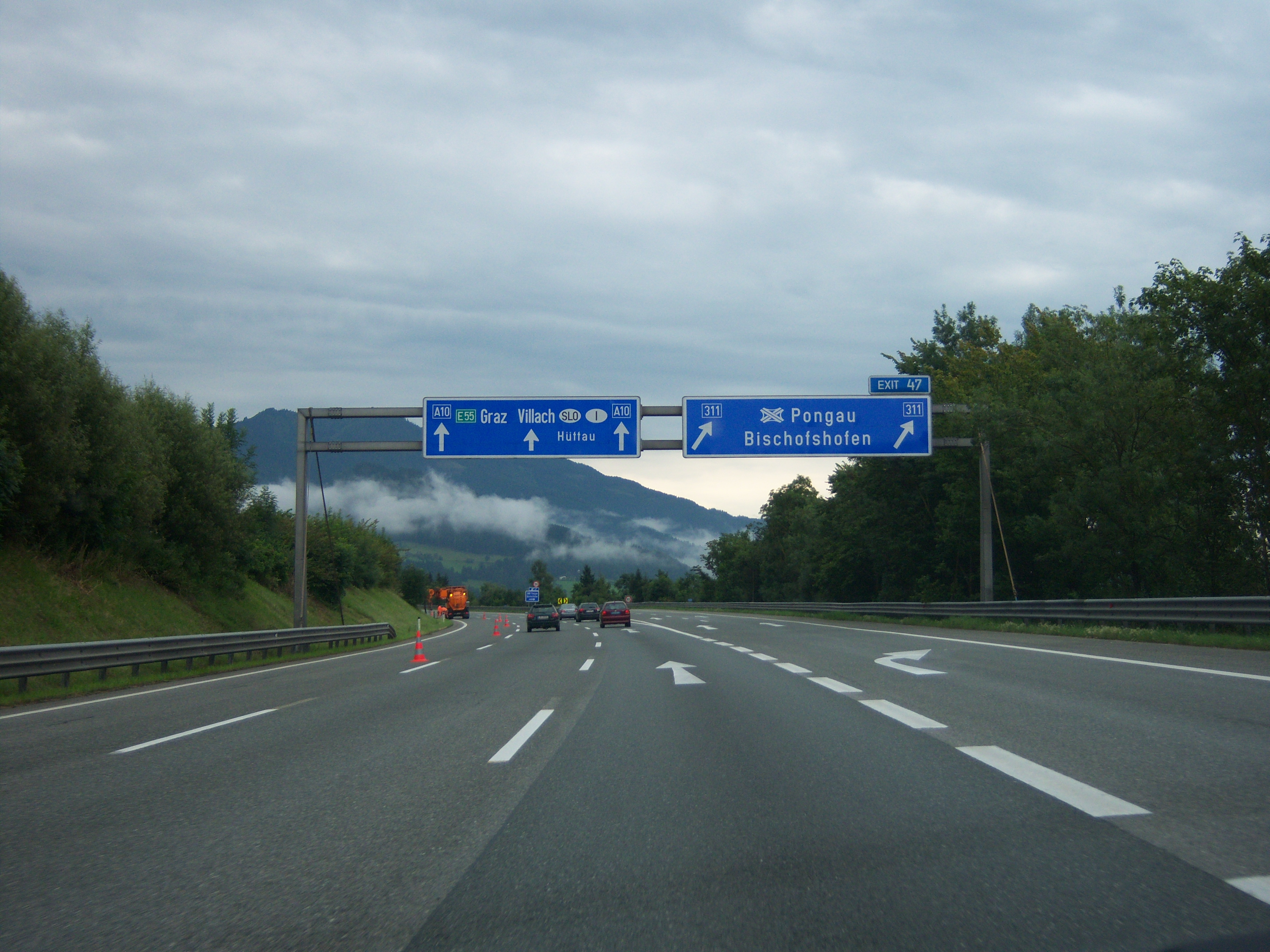 Tauern Autobahn A10 Richtung Villach am Knoten Pongau / Bischofshofen